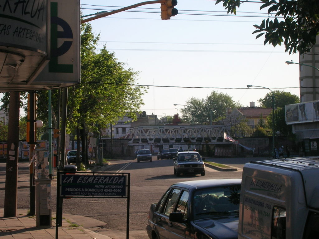 Foto de la Avenida Ruíz Huidobro del barrio de Saavedra, esquina con la calle Tronador